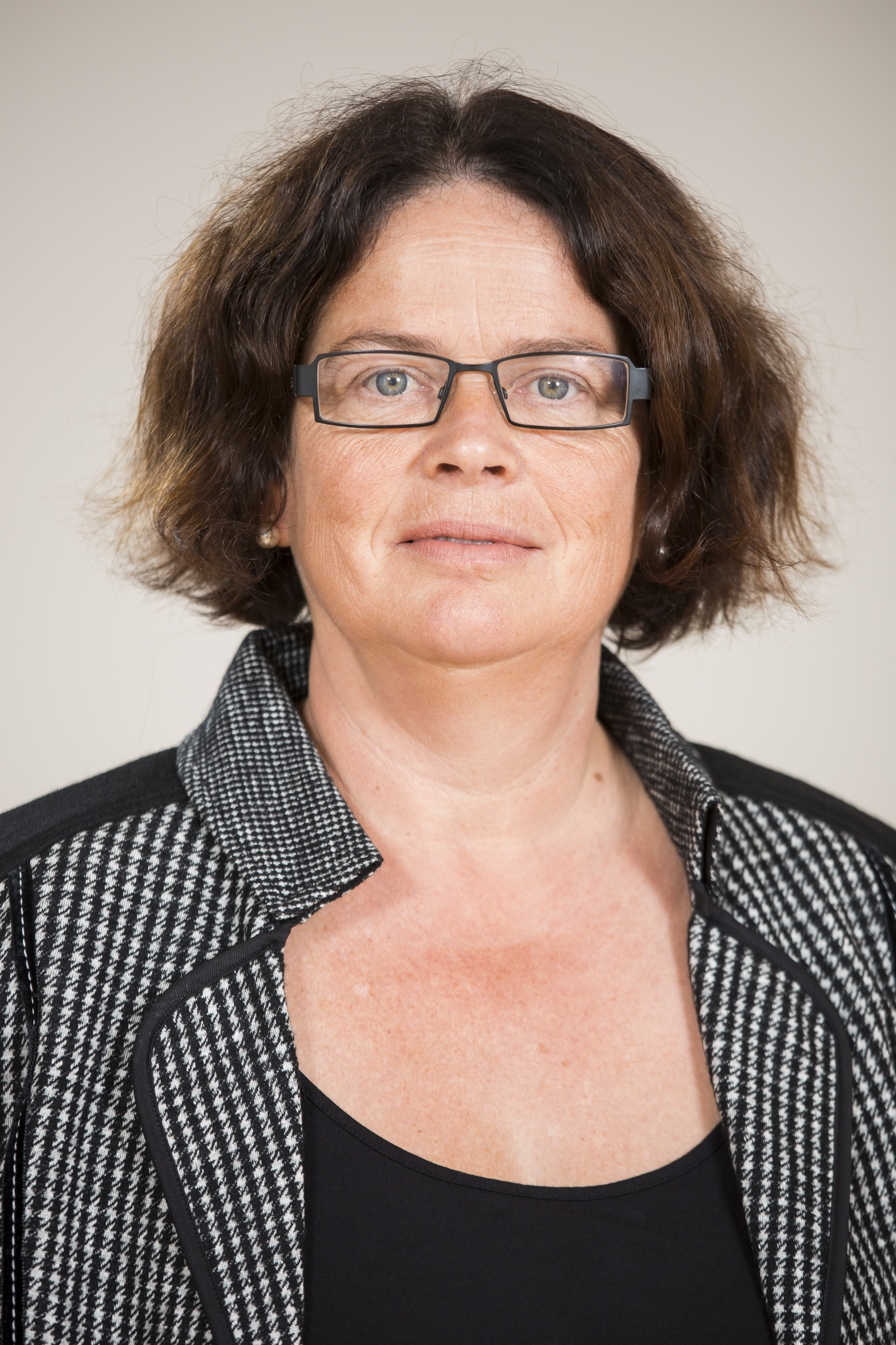 Anne-Claude Demierre en 2013